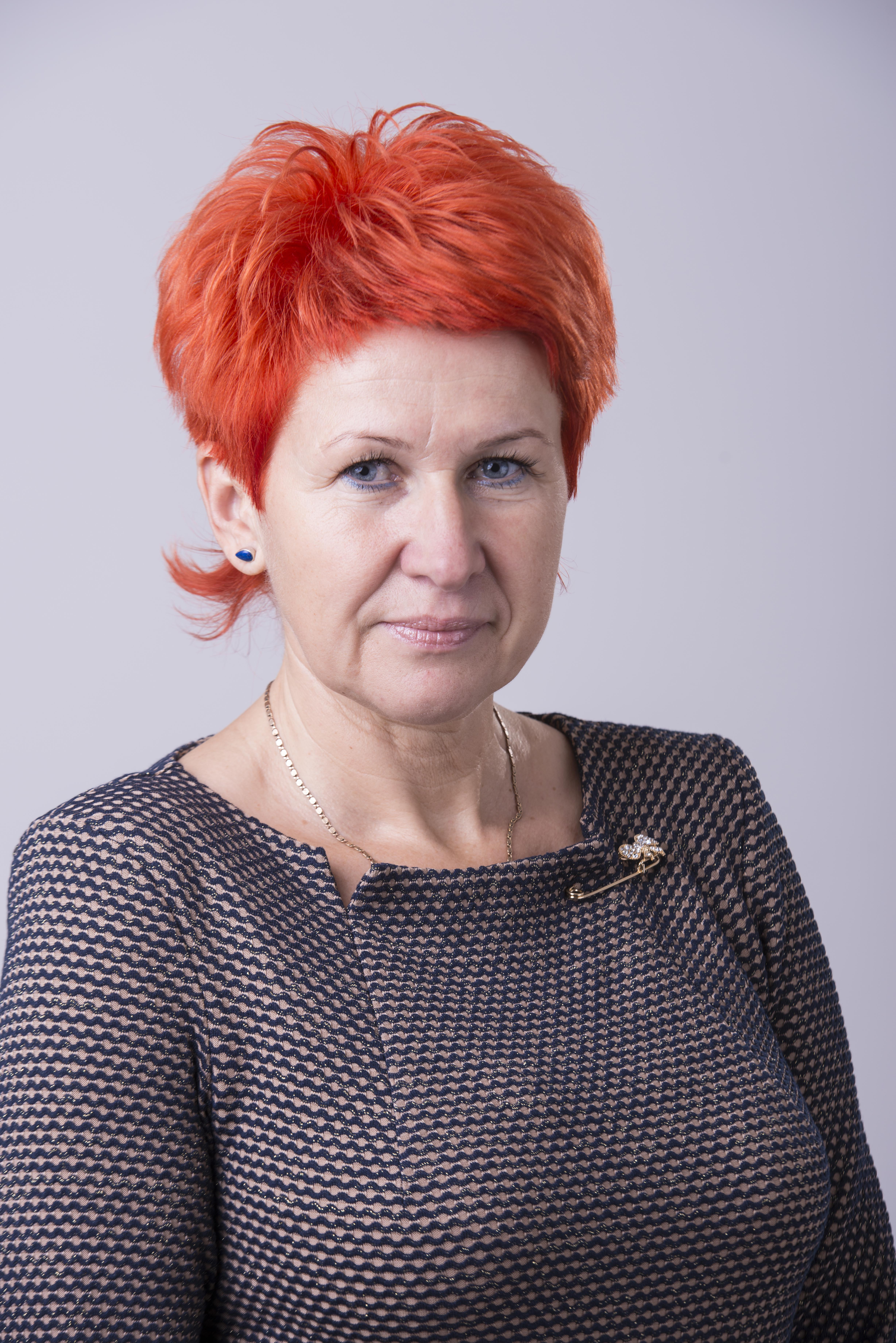 2014.gada 9.decembris. 12.Saeimas deputāte Janīna Kursīte. Foto: Reinis Inkēns, Saeimas Kanceleja Izmantošanas noteikumi: saeima.lv/lv/autortiesibas